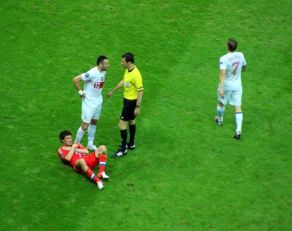 Zdjęcie zrobione w piątym dniu UEFA Euro 2012 w Warszawie, marszu rosyjskich kibiców i meczu Polska-Rosja.